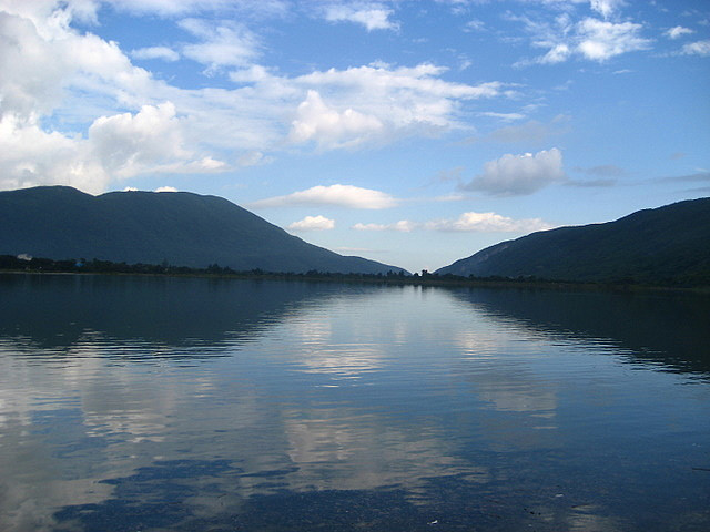 Mona Watervoir